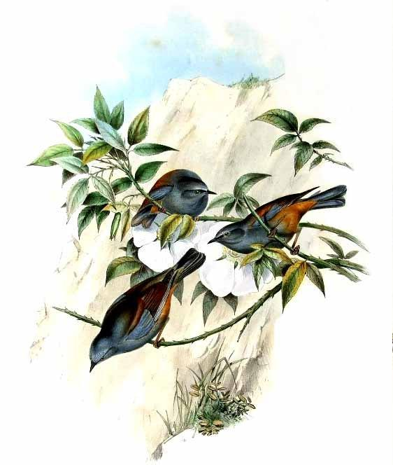 Accenteur immaculé